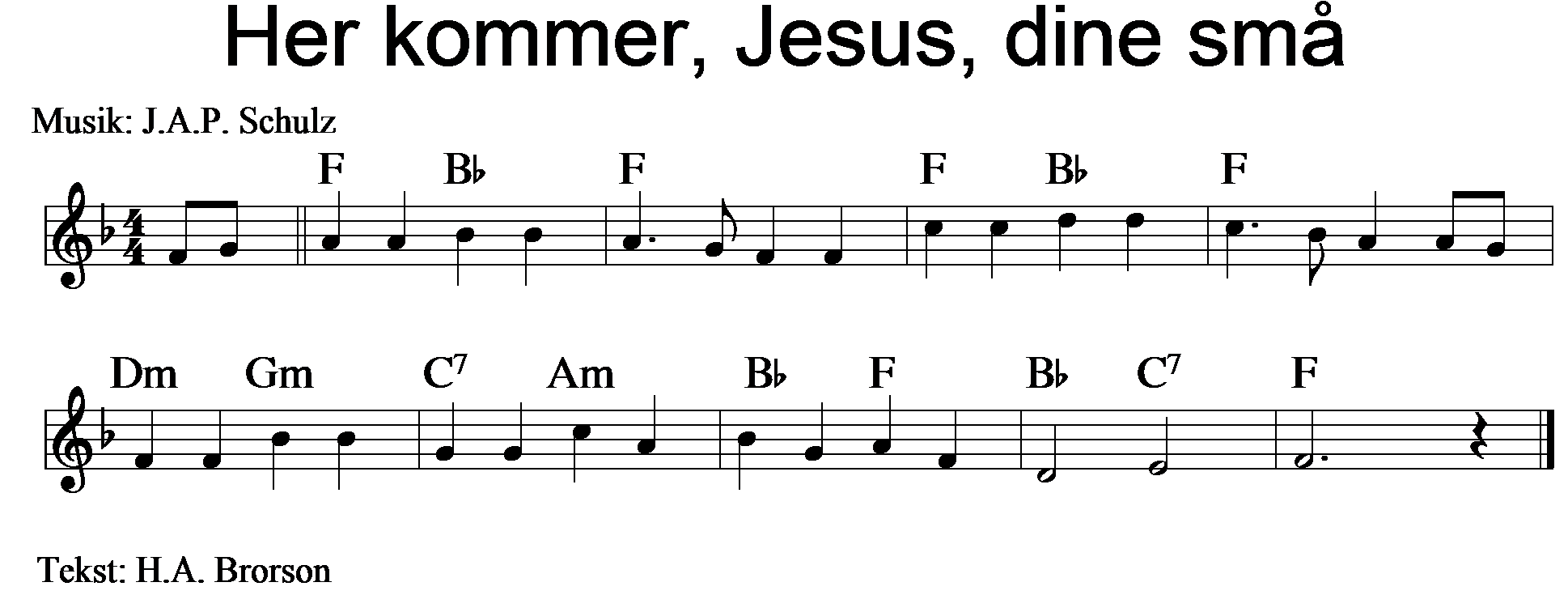 Her kommer, Jesus, dine små.